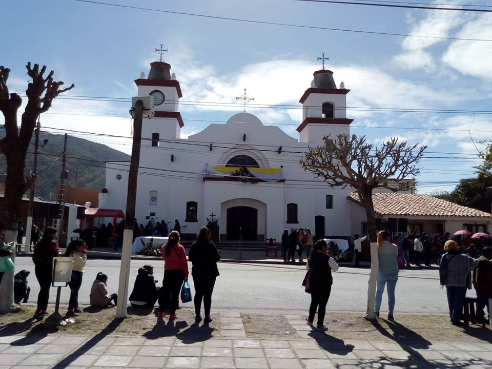 Erigida en el año 1959. La parroquia cuenta con un importante patrimonio arquitectónico. El 23 de Diciembre del año 2000, el actual Arzobispo de Salta, Mons. Mario Antonio Cargnello bendijo el frente remodelado del templo. La fiesta Patronal en honor a Santiago Apóstol, Patrono de la Parroquia. Su nombre significa “Protegido de Dios” es patrono de España y de la Caballería.fachada de iglesia